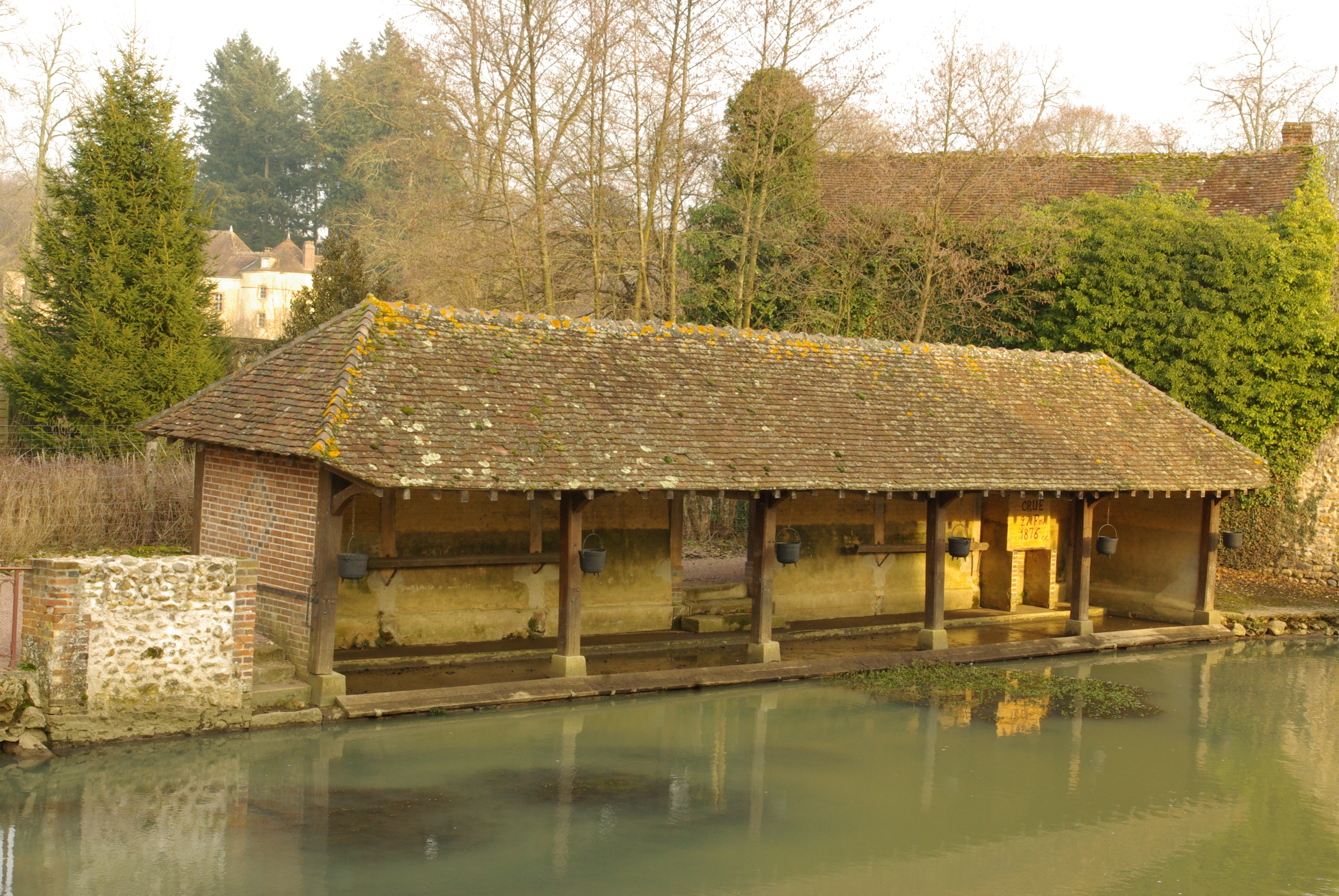 Tannerre-en-Puisaye Lavoir inondable le long du Branlin. Du pont de la rue Saint-Blaise, vue vers l'amont.